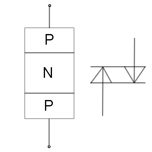 struktura a schematicka znacka diaka